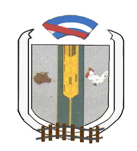 Escudo de Seguí, Entre Rios.